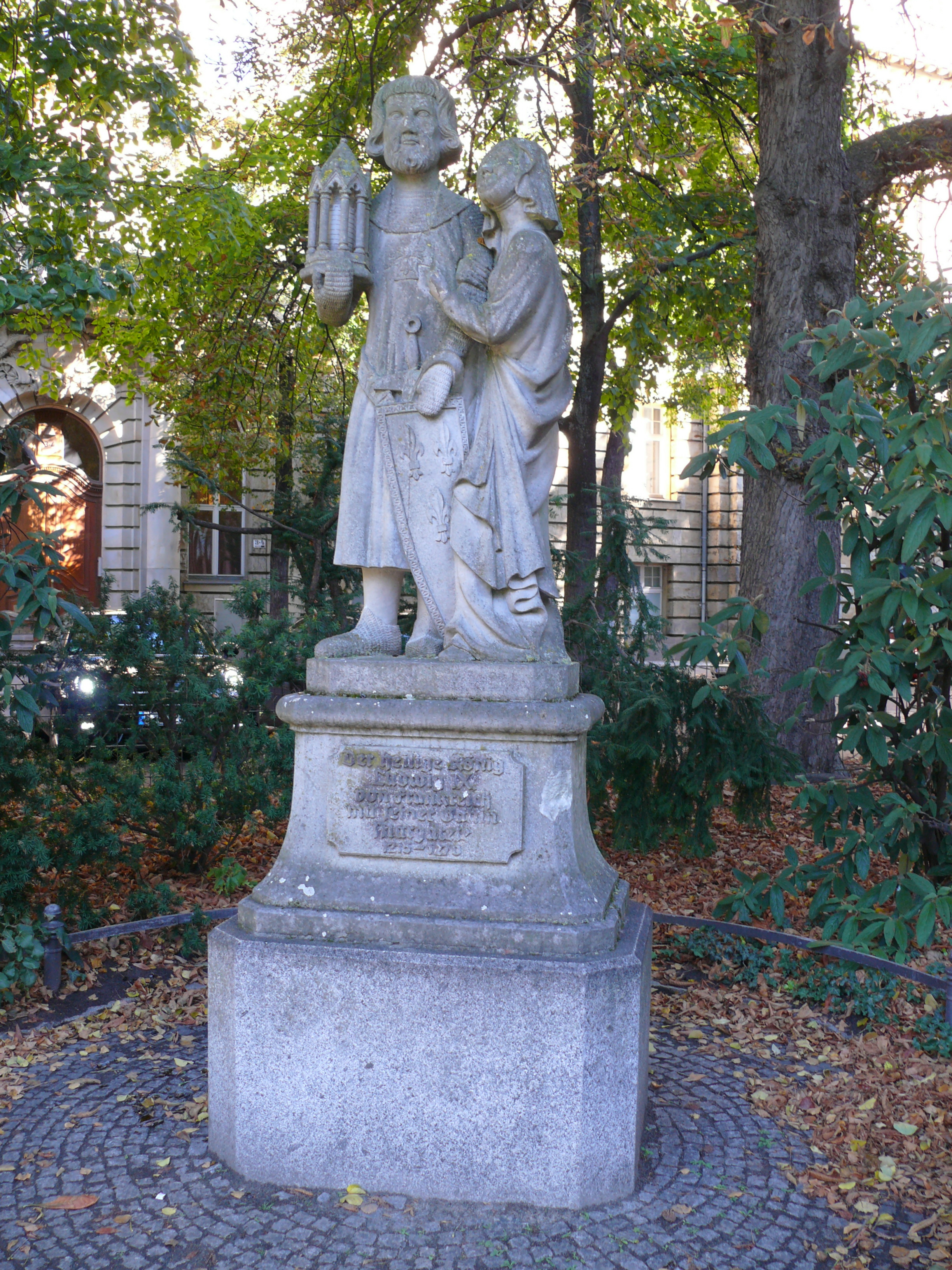 Berlin-Wilmersdorf Ludwigkirchplatz Statue Ludwixg IX